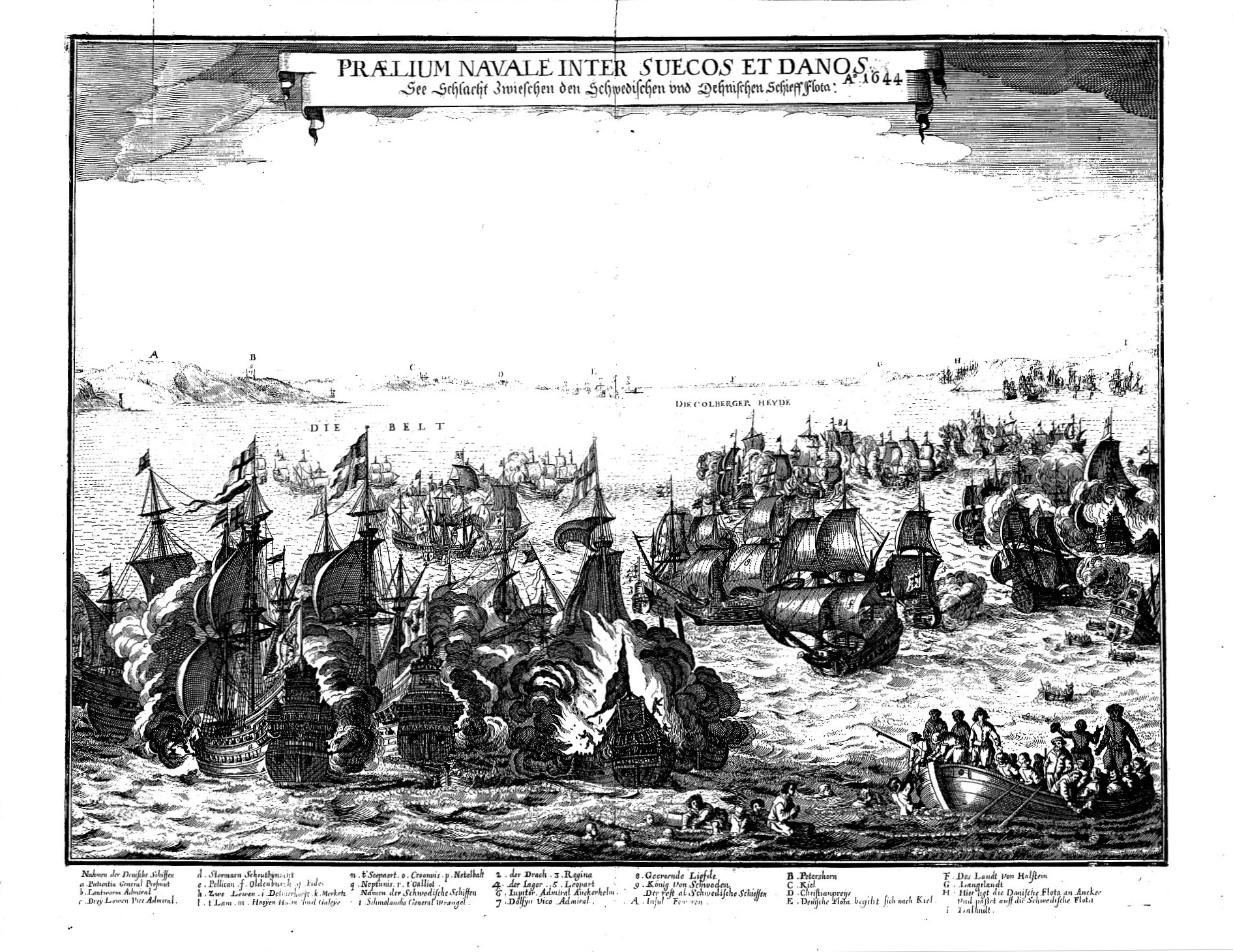 Druckgraphik der Seeschlacht im Oktober 1644